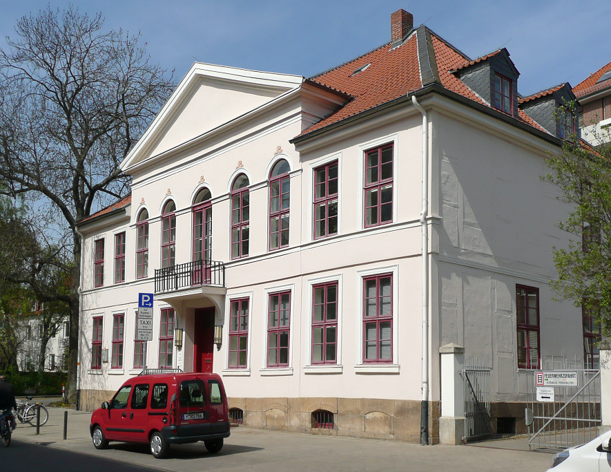 Dachenhausen Wohnhaus Calenberger Neustadt